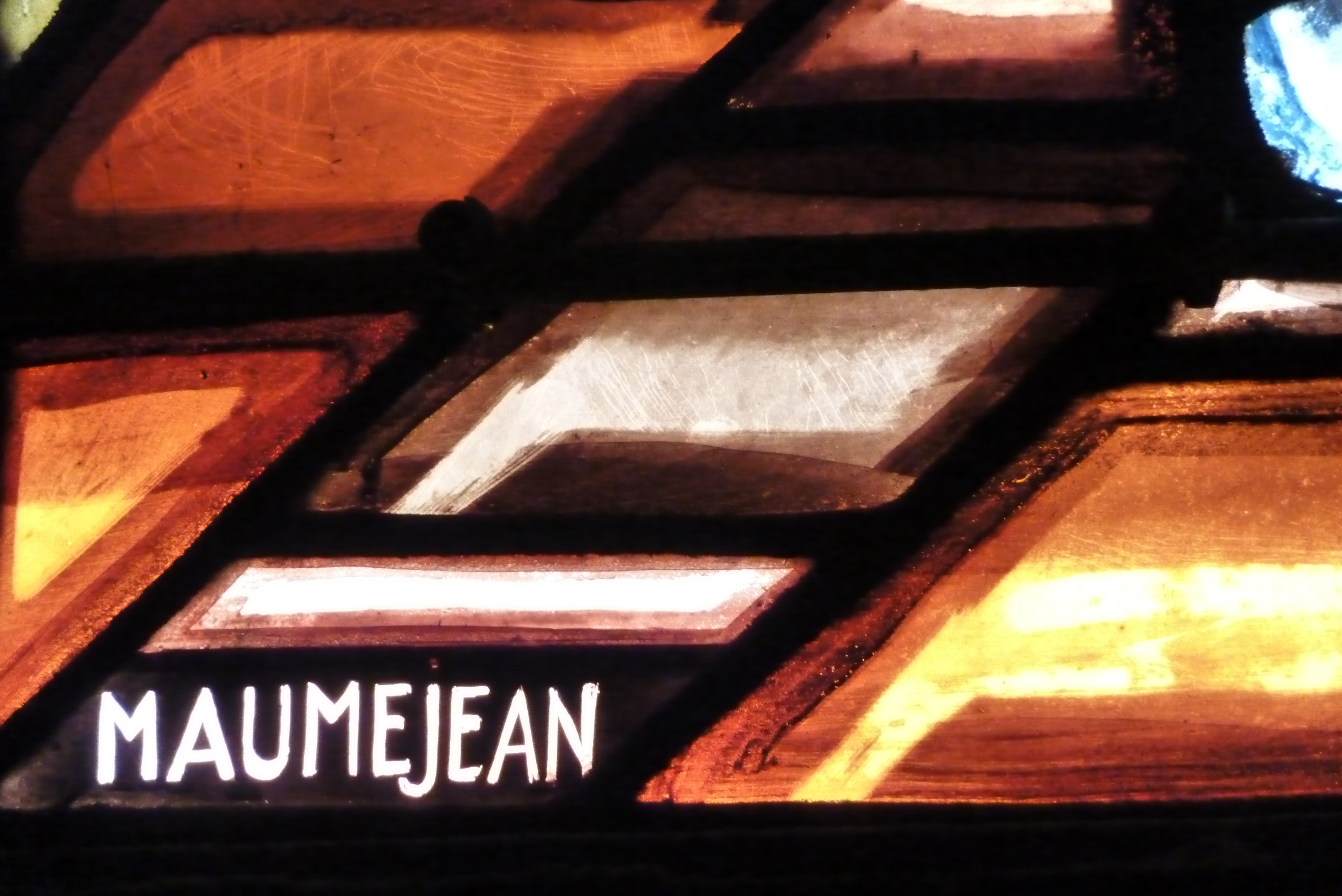 Ausschnitt eines Bleiglasfensters in der Kirche (linkes Querhaus) Saint-Jean-Bosco in Paris (79, rue Alexandre-Dumas im 20. arrondissement), Darstellung: Dominic Savio, hier Signatur: "MAUMEJEAN"